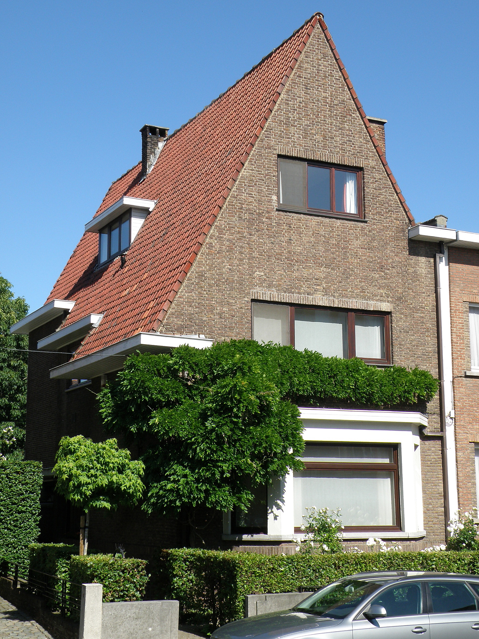 Antwerpen, België. Woonhuis Hof ter Schriecklaan n°29, in Nieuwe-Zakelijkheidstijl, bouwjaar 1931, n.o.v. archit. Emiel Van Averbeke.